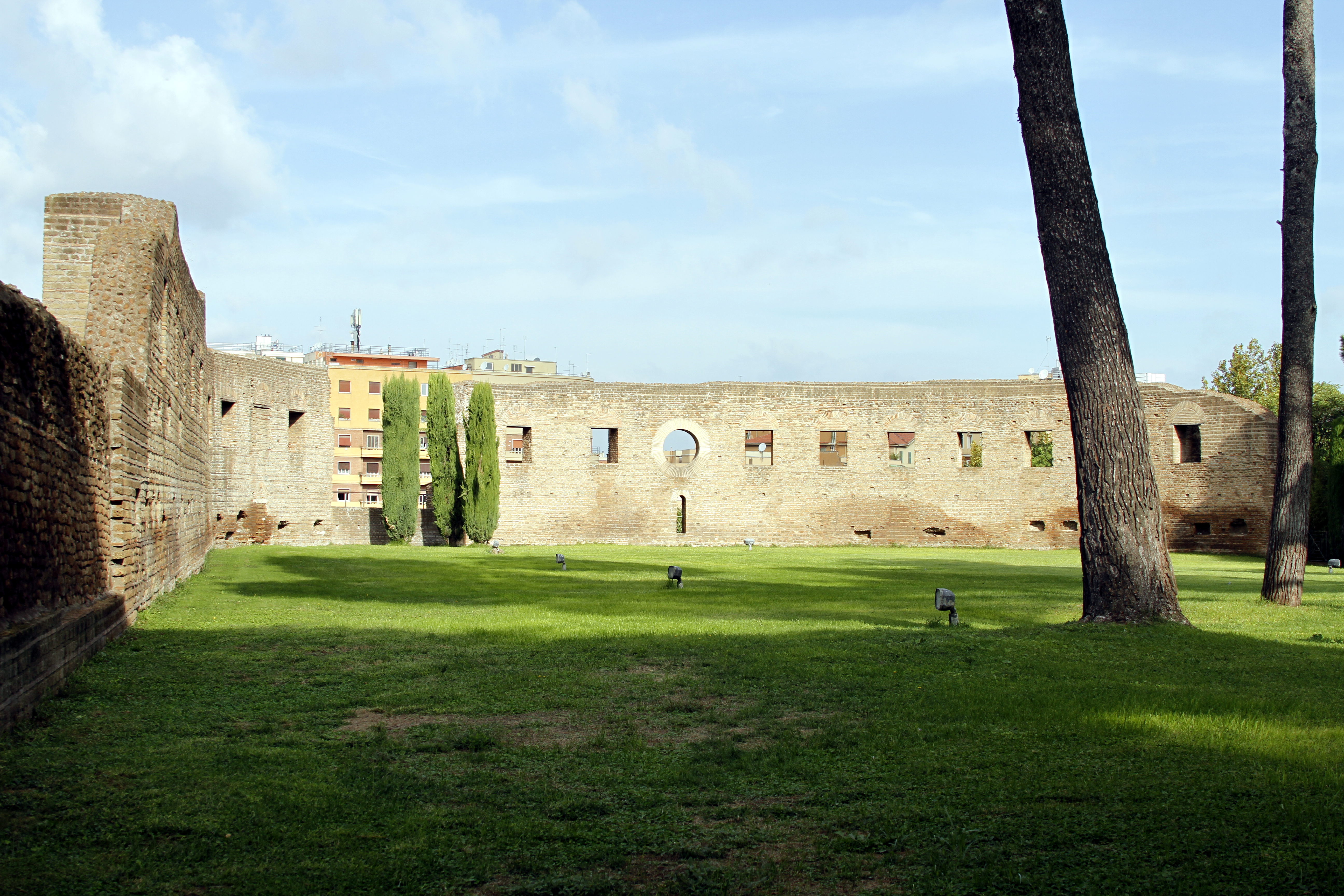 Sant'Agnese fuori le mura - Rome